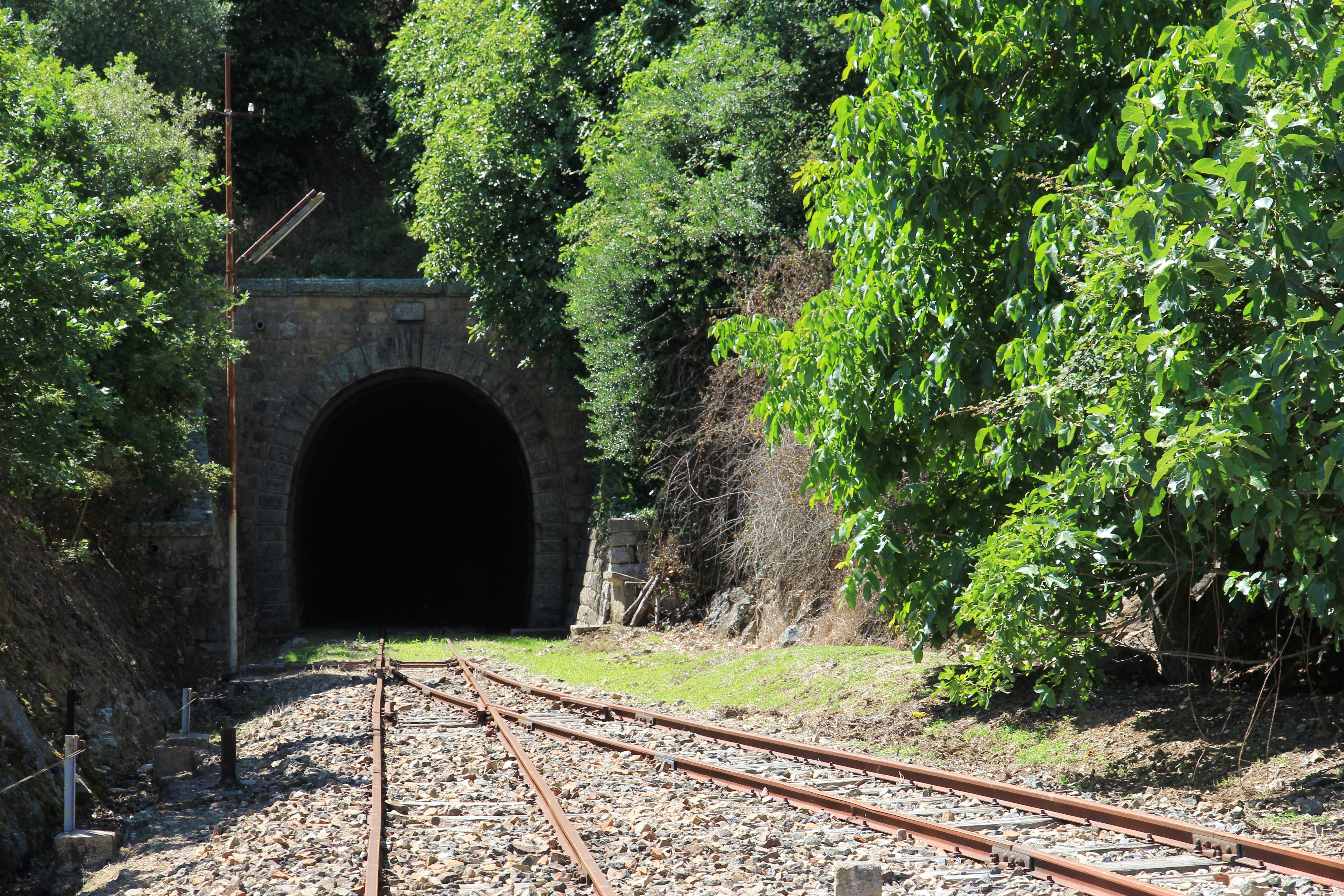 Bortigiadas - Stazione dell'ARST (ex Ferrovie della Sardegna)